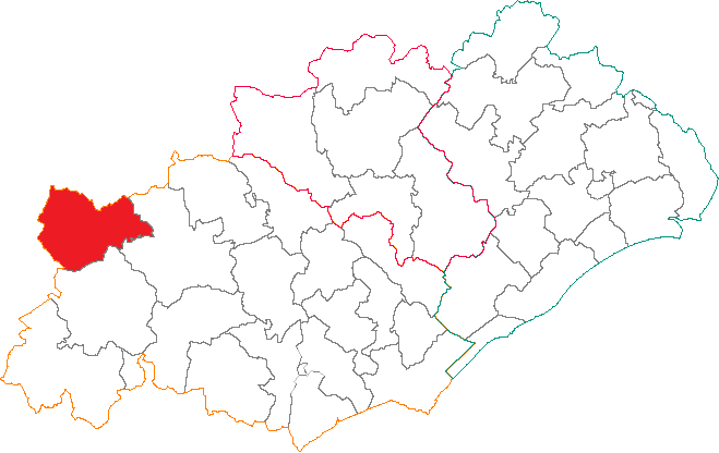 Situation du canton dans le département de l'Hérault.